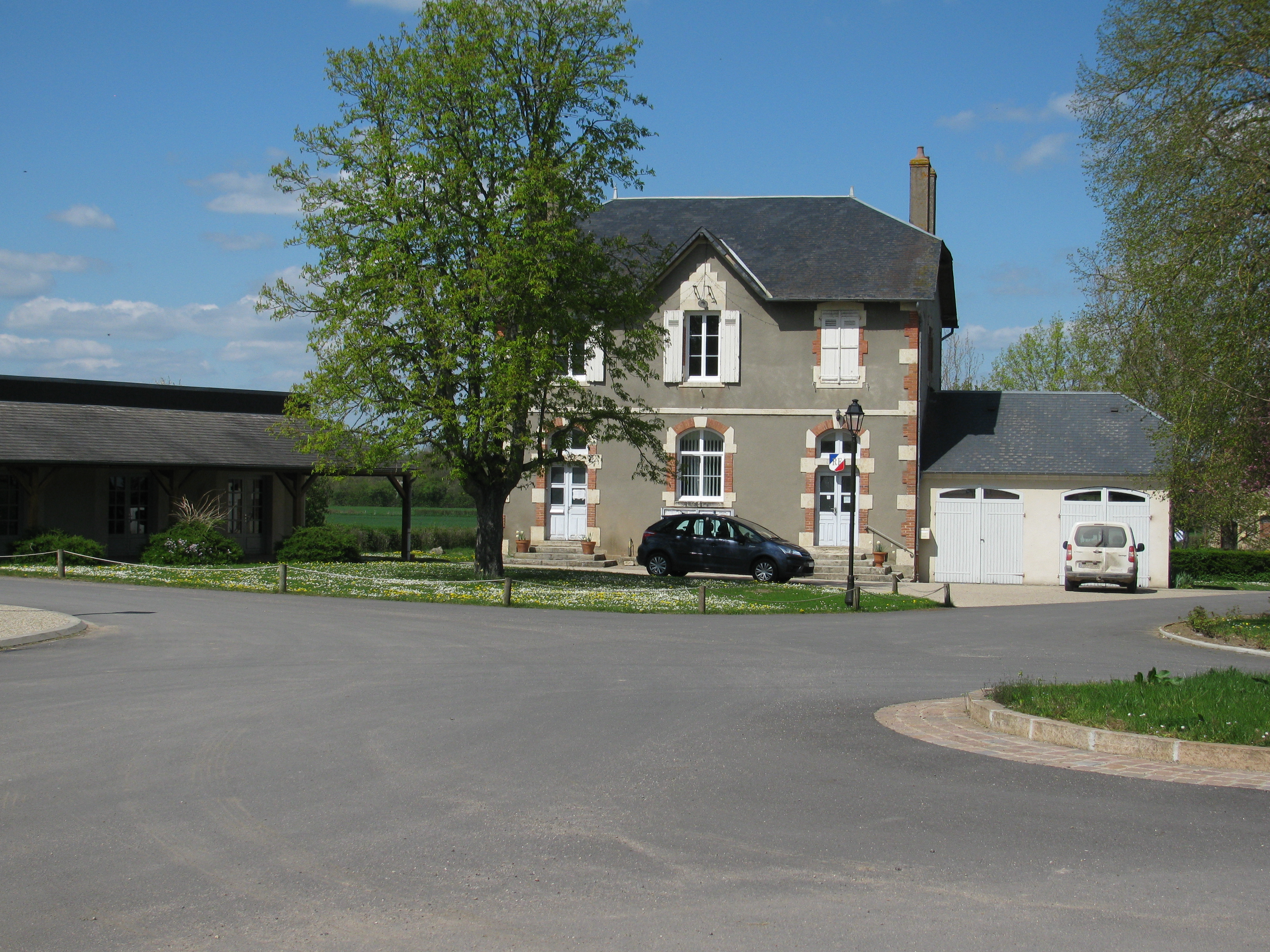 Mairie d'Avril-sur-Loire, Nièvre, France.